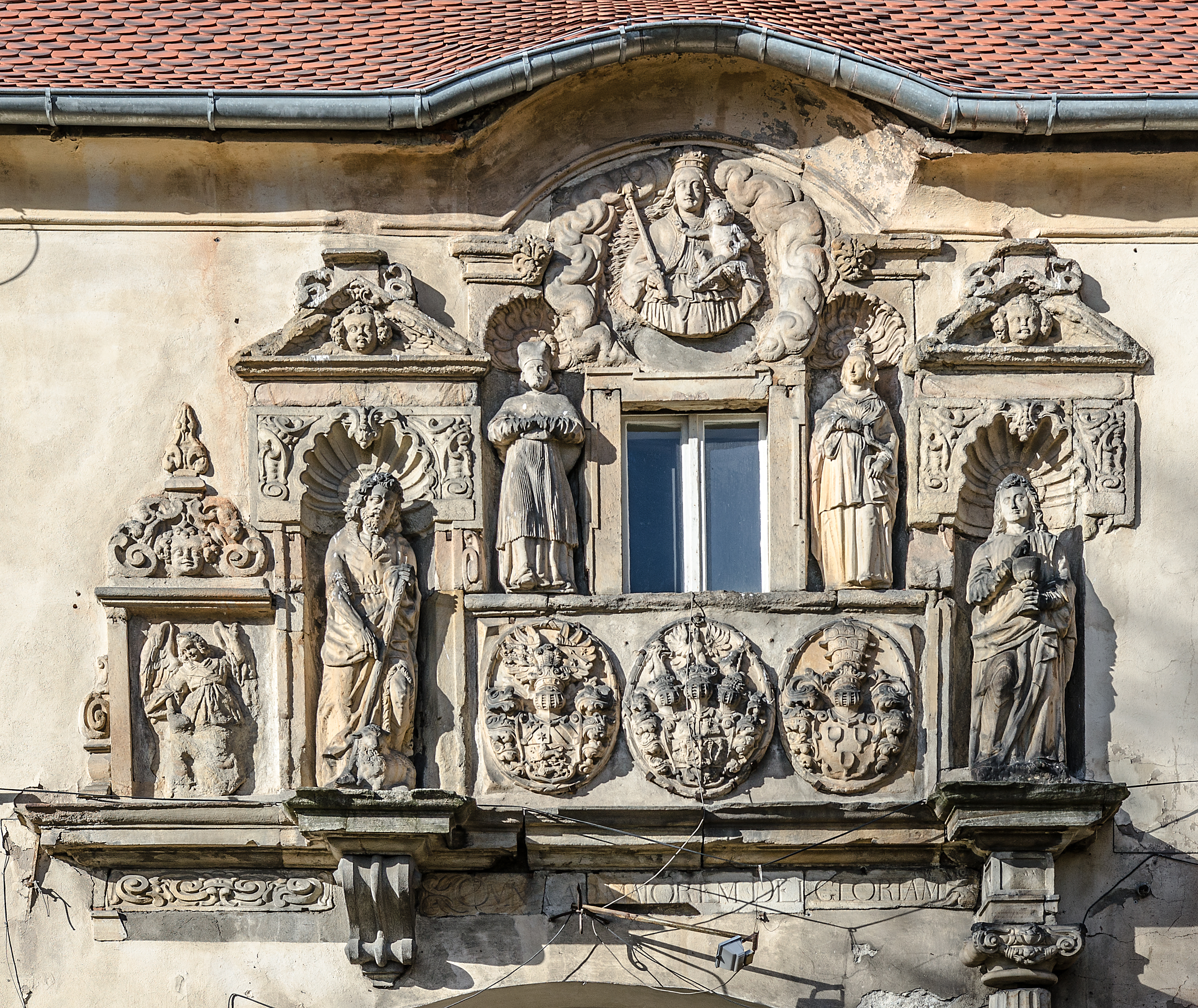 Głogówek, brama zamkowa (folwarczna), 1700